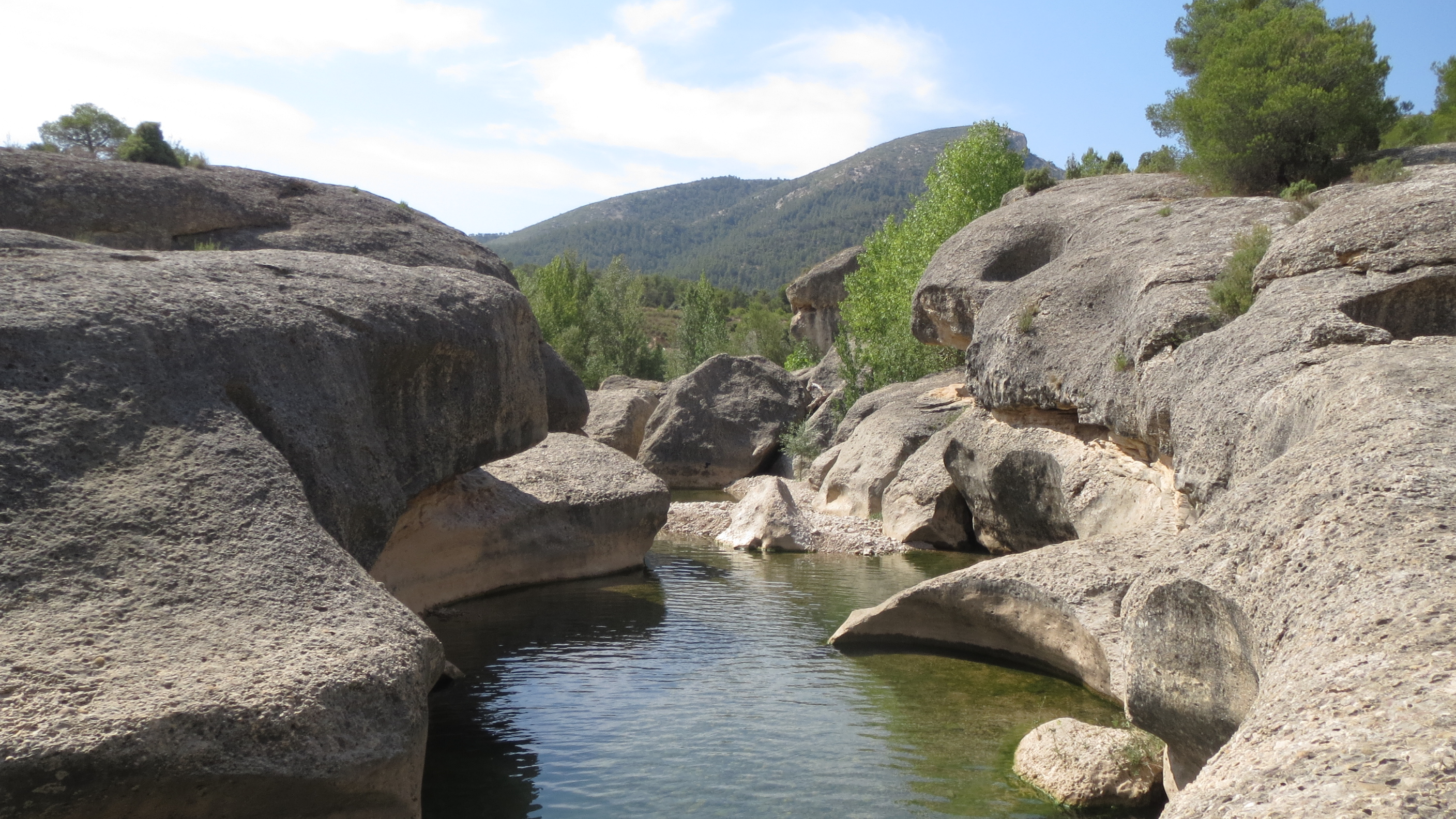 Río Bergantes This is a photography of a Site of Community Importance in Spain with the ID: ES2420117. Natura2000 entry, EEA entry